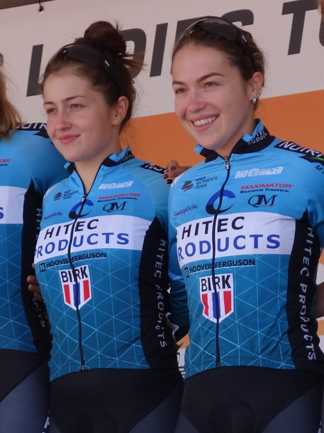 Zussen Grace en Lucy Garner (Hitec) bij de start van de eerste etappe van Stramproy naar Weert in de Boels Ladies Tour 2019